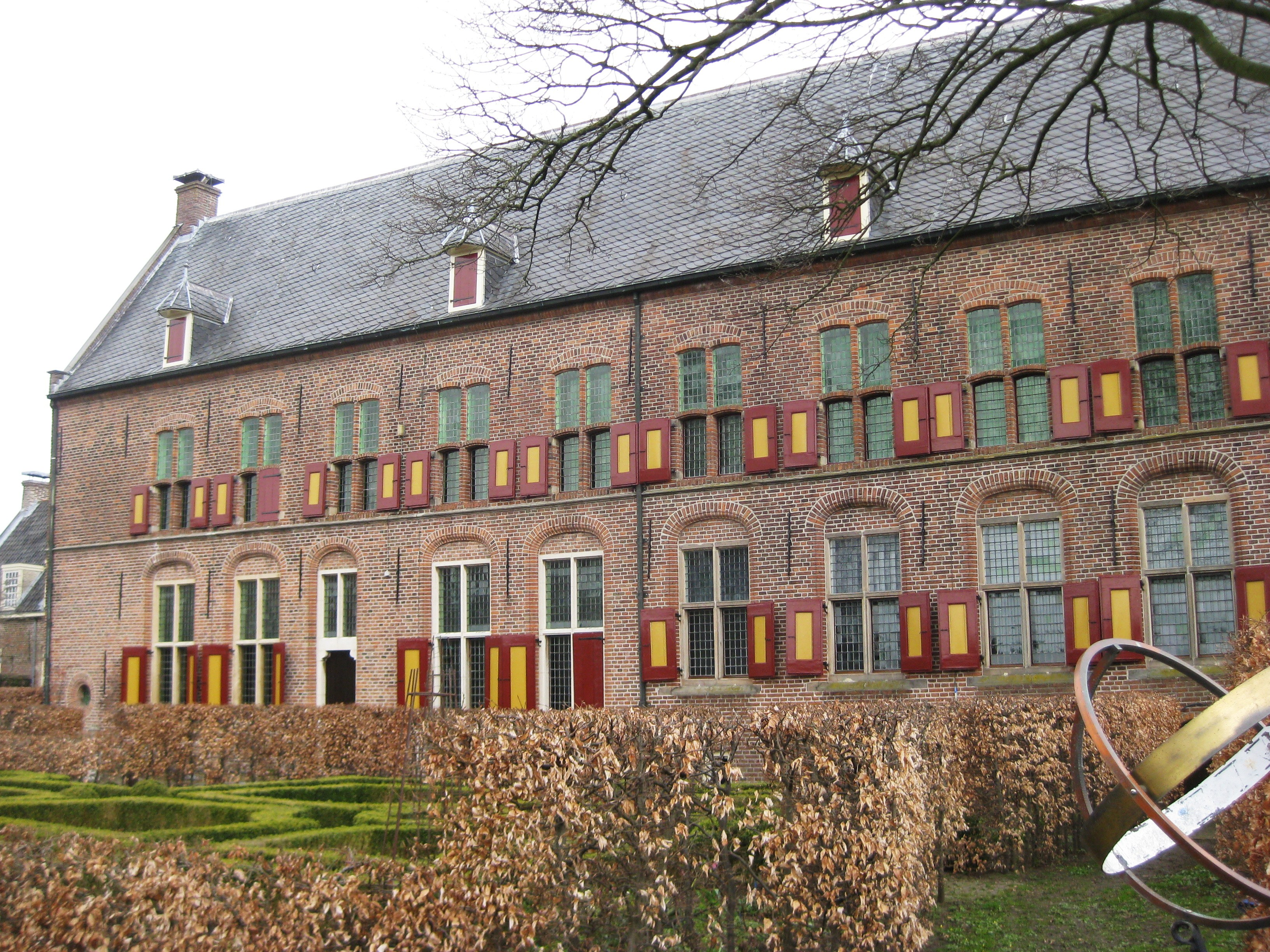 Elisabethweeshuis westgevel